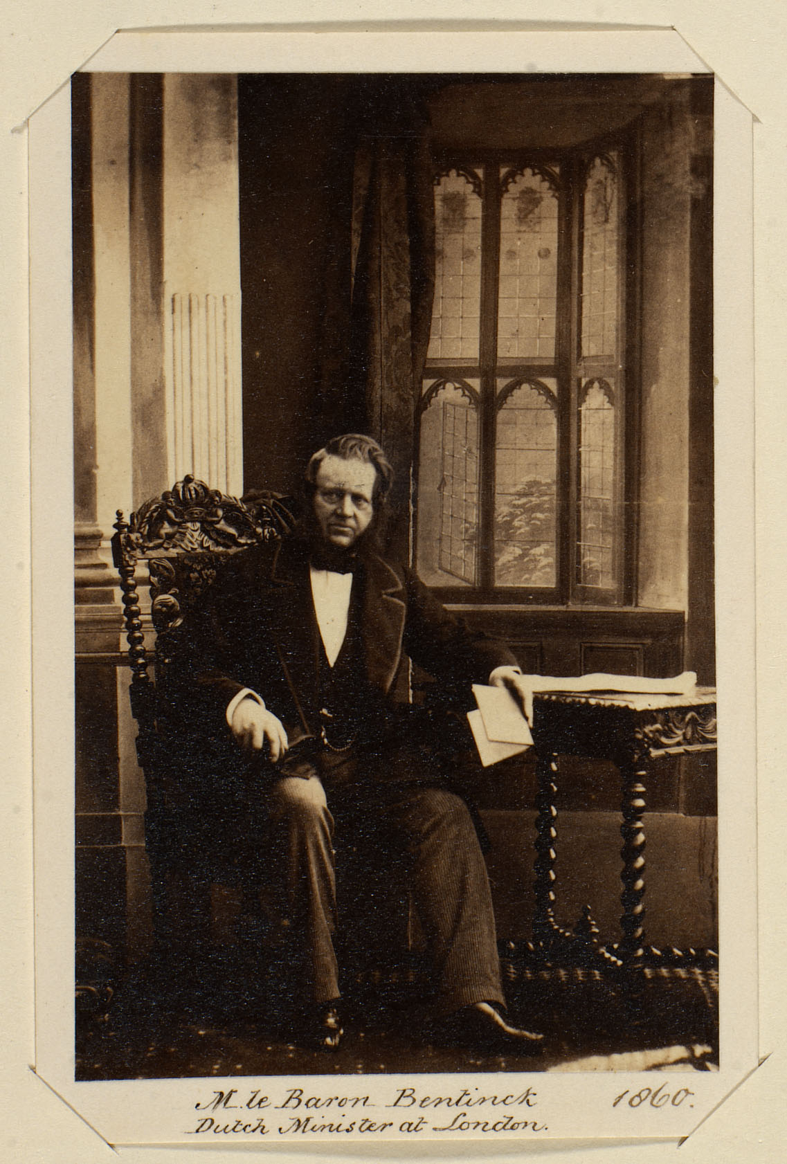 8.5 x 5.2 cm (image)